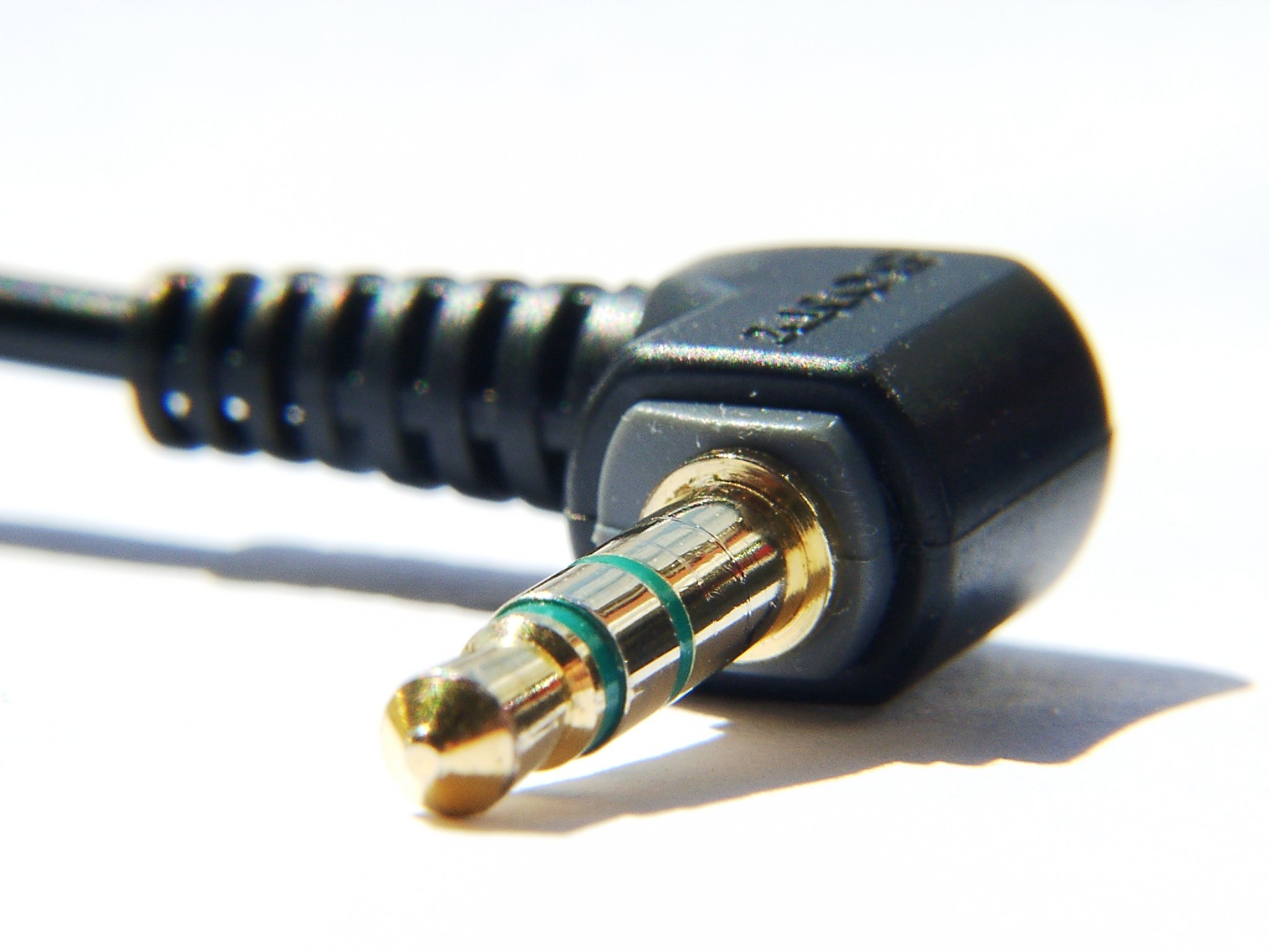 Klinkenstecker 3.5 mm